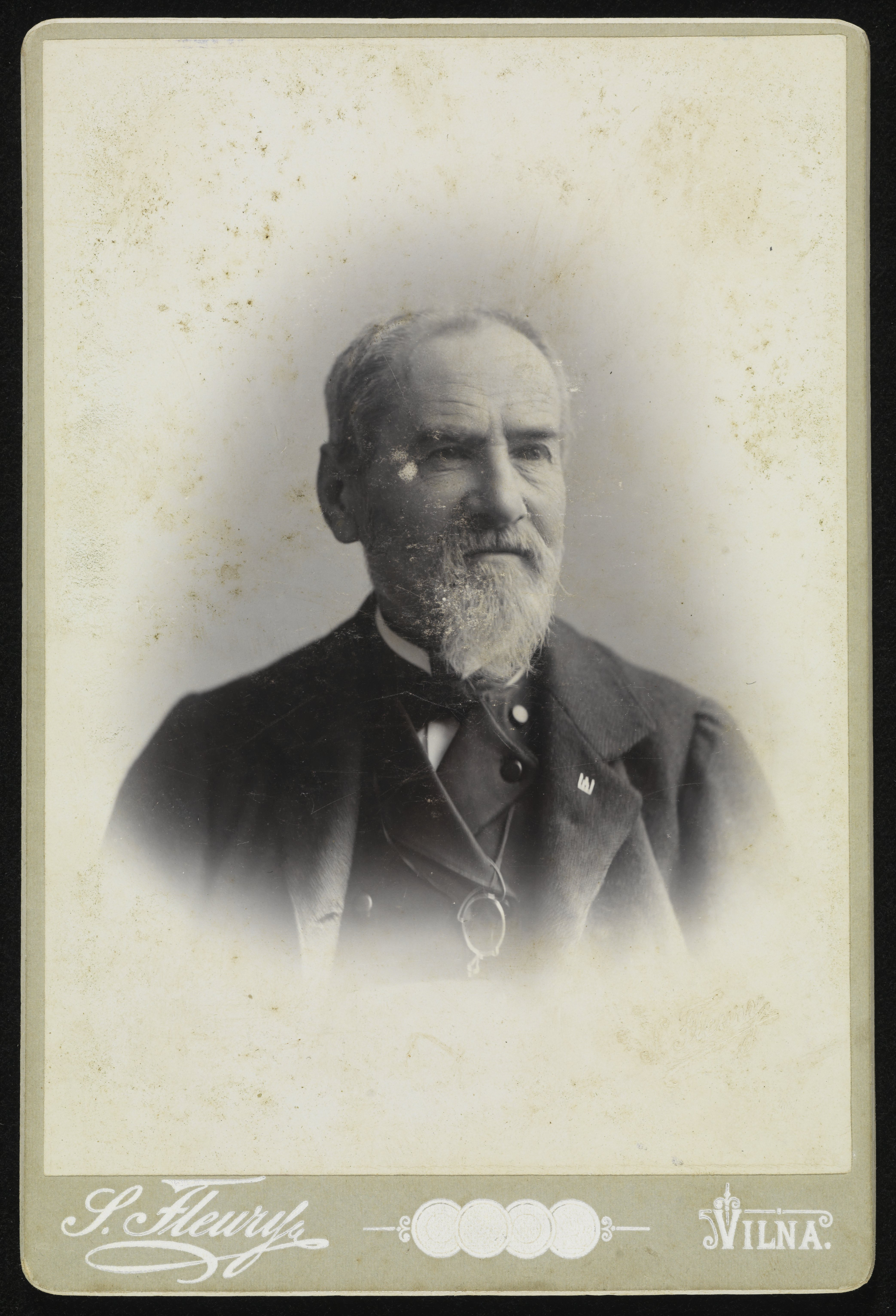 Bolesław Rusiecki, po 1898 r.